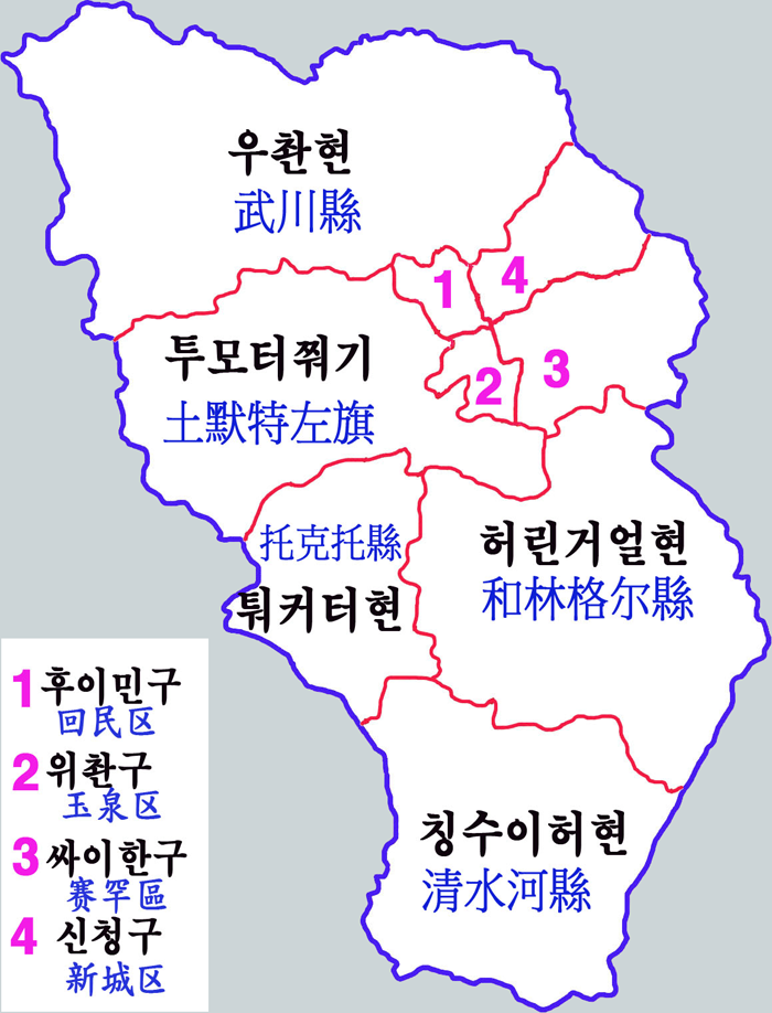 후허하오터사 현급행정구역도